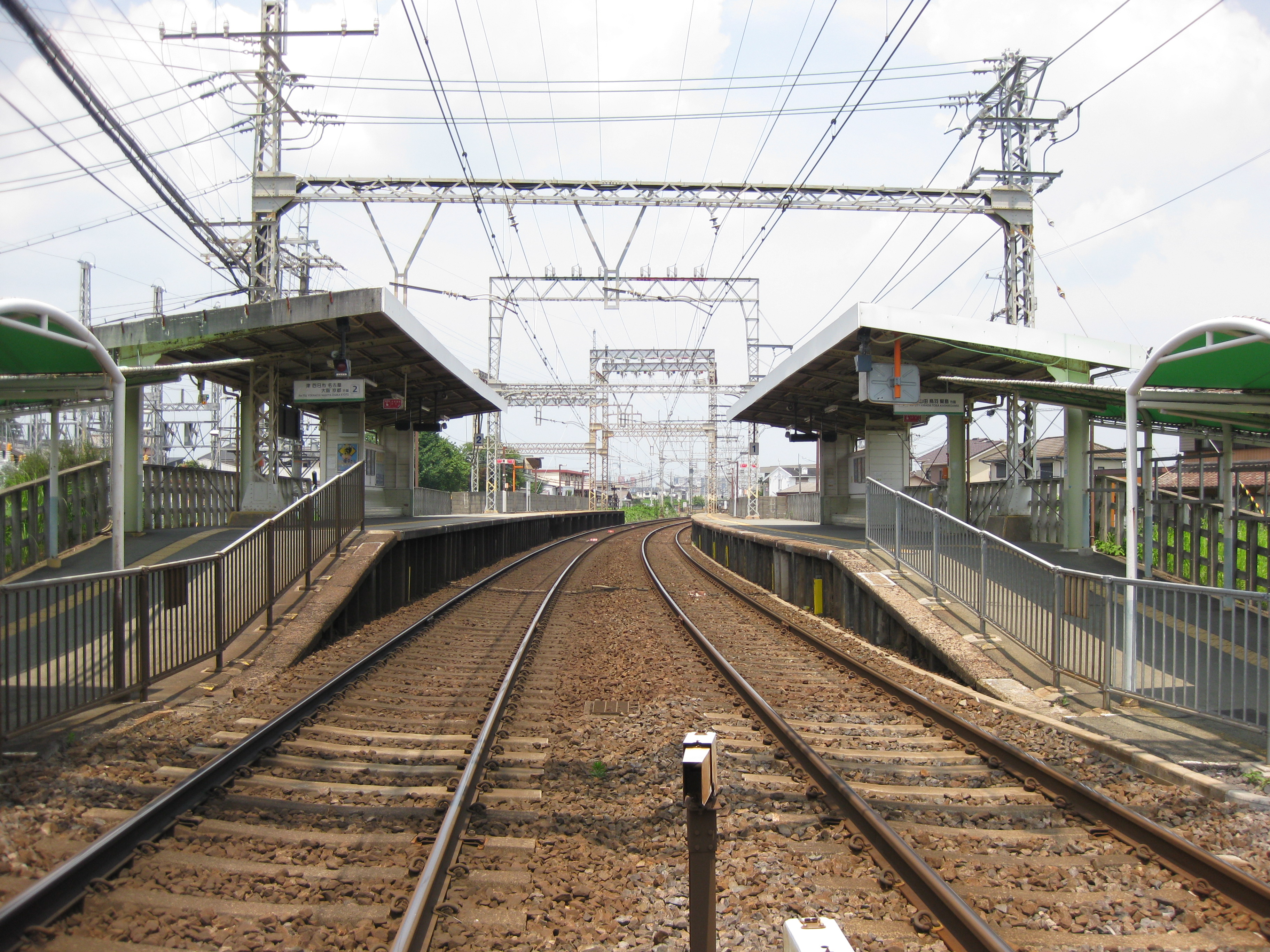 東松阪駅プラットホーム